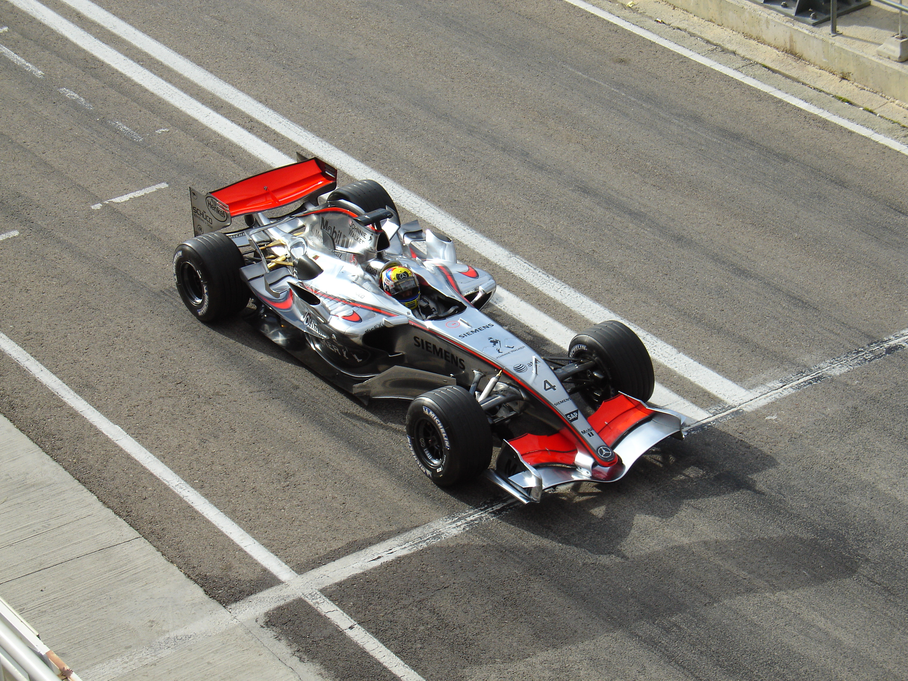 Juan Pablo Montoya at Cheste Circuit (Valencia)